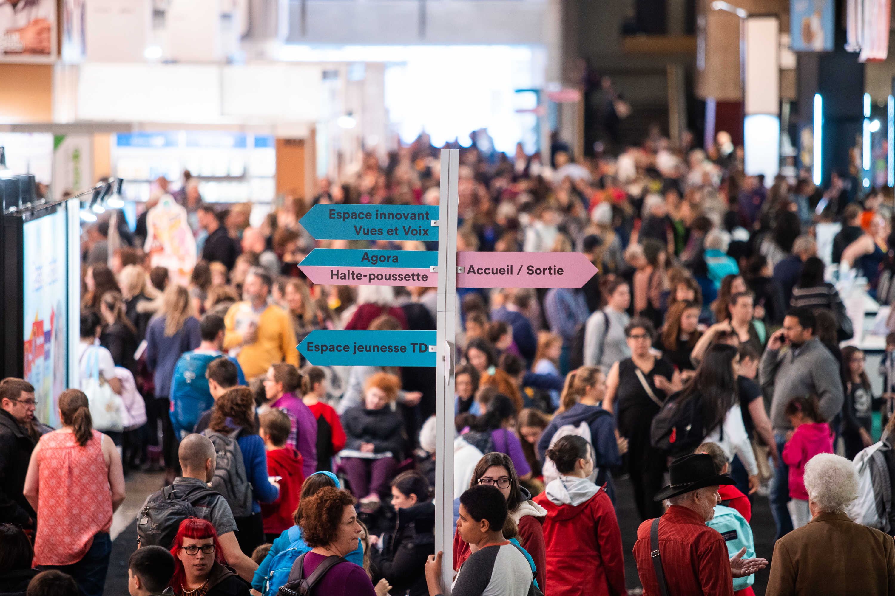 Le Salon du livre de Montréal en 2019.